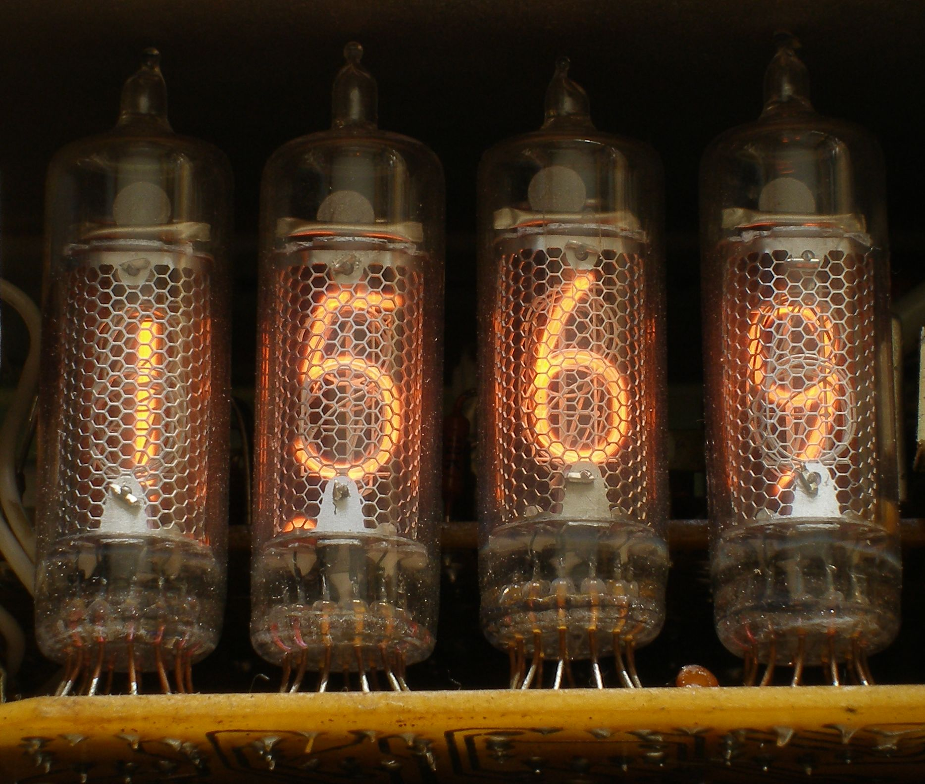 Working russian nixie tubes IN-16 (ИН-16)